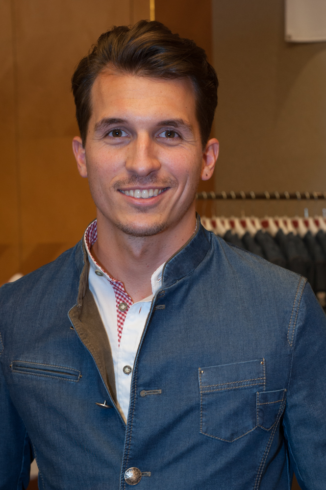 Einkleidung der Österreichischen Teilnehmer an den Olympischen Sommerspielen 2016 am 16./17. Juli 2016 in Wien. Bild zeigt René Pranz.